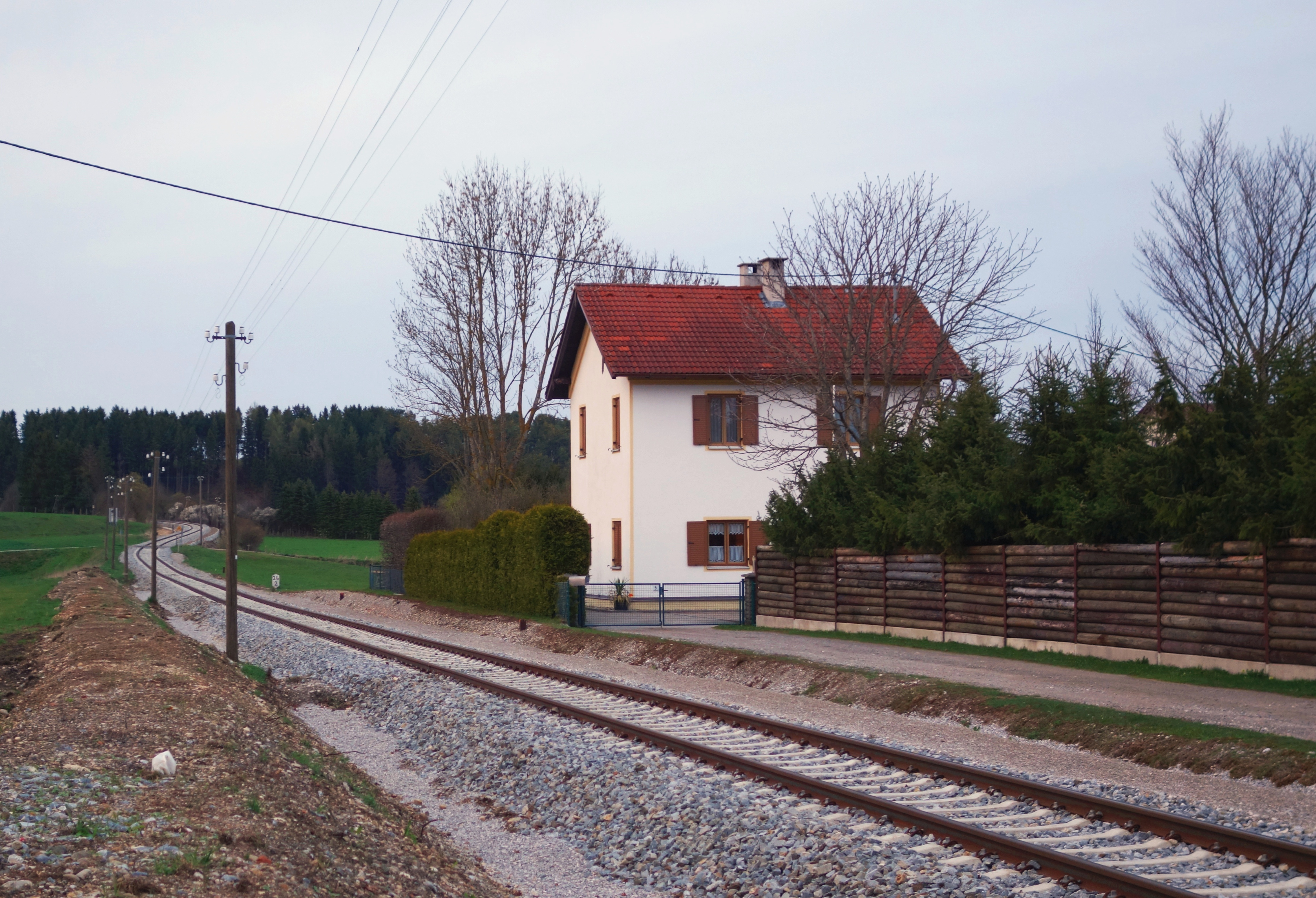 Ehemaliger Bahnhof Hohenfurch, Zustand April 2014 nach der Erneuerung des Gleises und dem Abbau der Bahnsteigreste im September/Oktober 2013